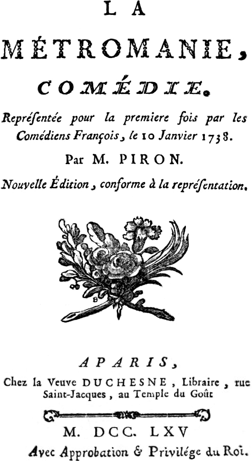 Front page of La Métromanie by Alexis Piron (1689-1773)